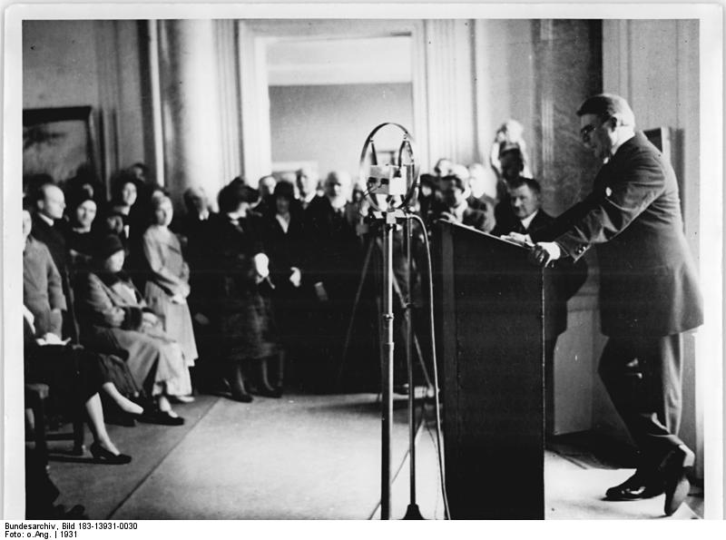 Berlin, Große Kunstausstellung, Eröffnung Eröffnung der Großen Berliner Kunstausstellung im Schloss Bellevue. Hans Baluschek spricht 13931-31 Abgebildete Personen: Baluschek, Hans Prof.: Maler, Grafiker, Deutschland